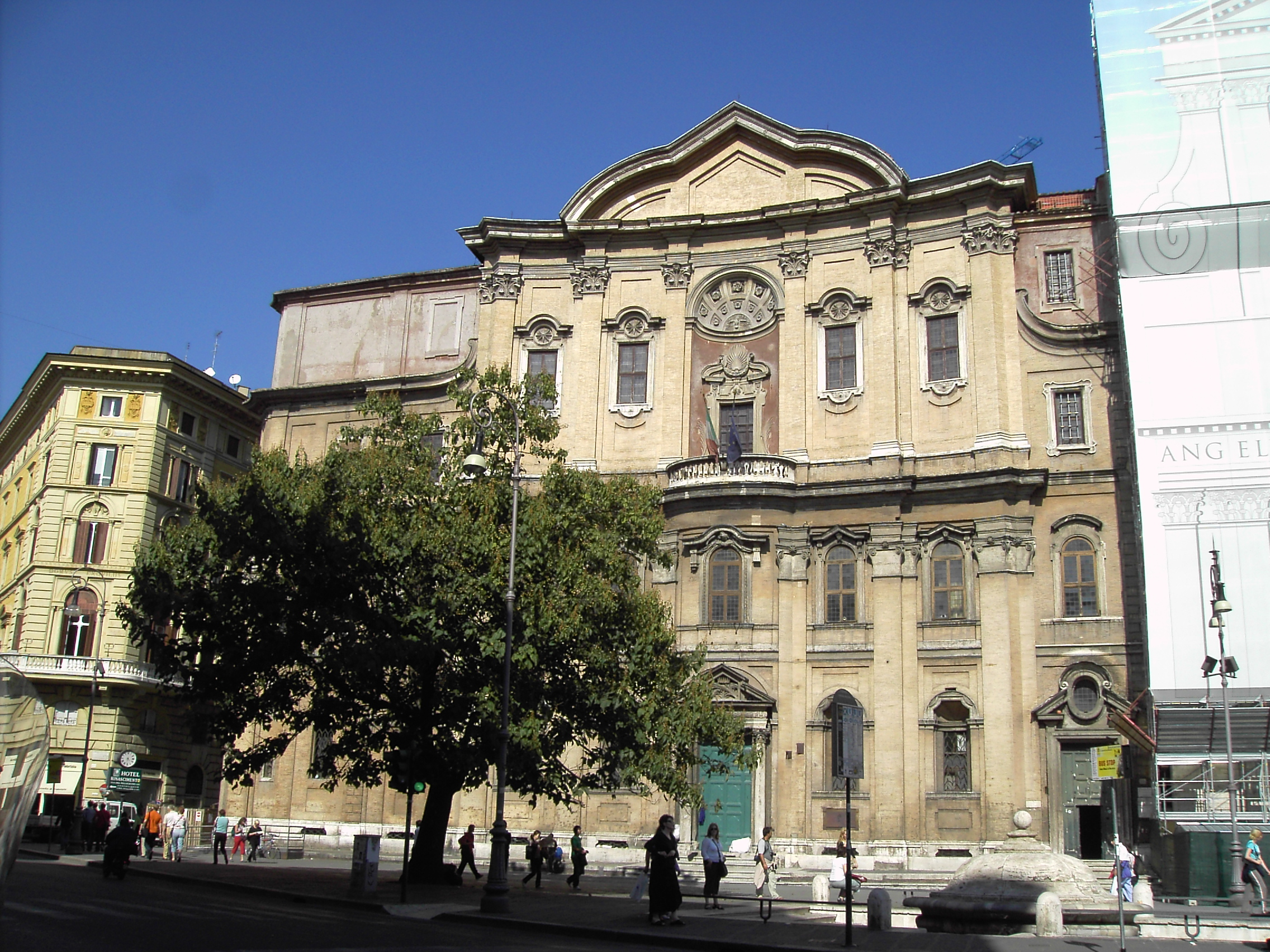 Roma, Oratorio dei Filippini, accanto a Santa Maria in Vallicella.